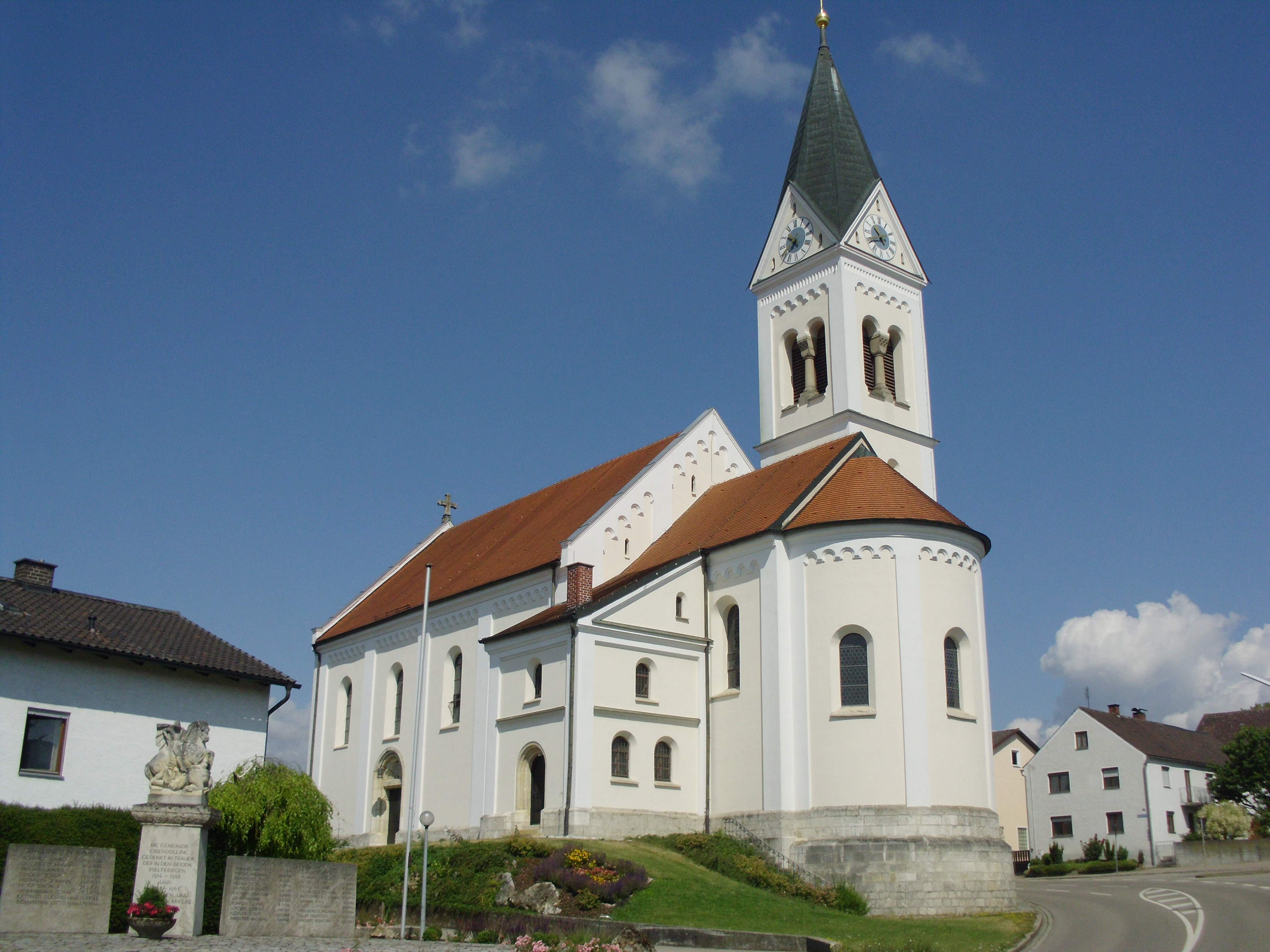 Oberdolling, neuromanische kath. Pfarrkirche St. Georg aus südöstlicher Sicht